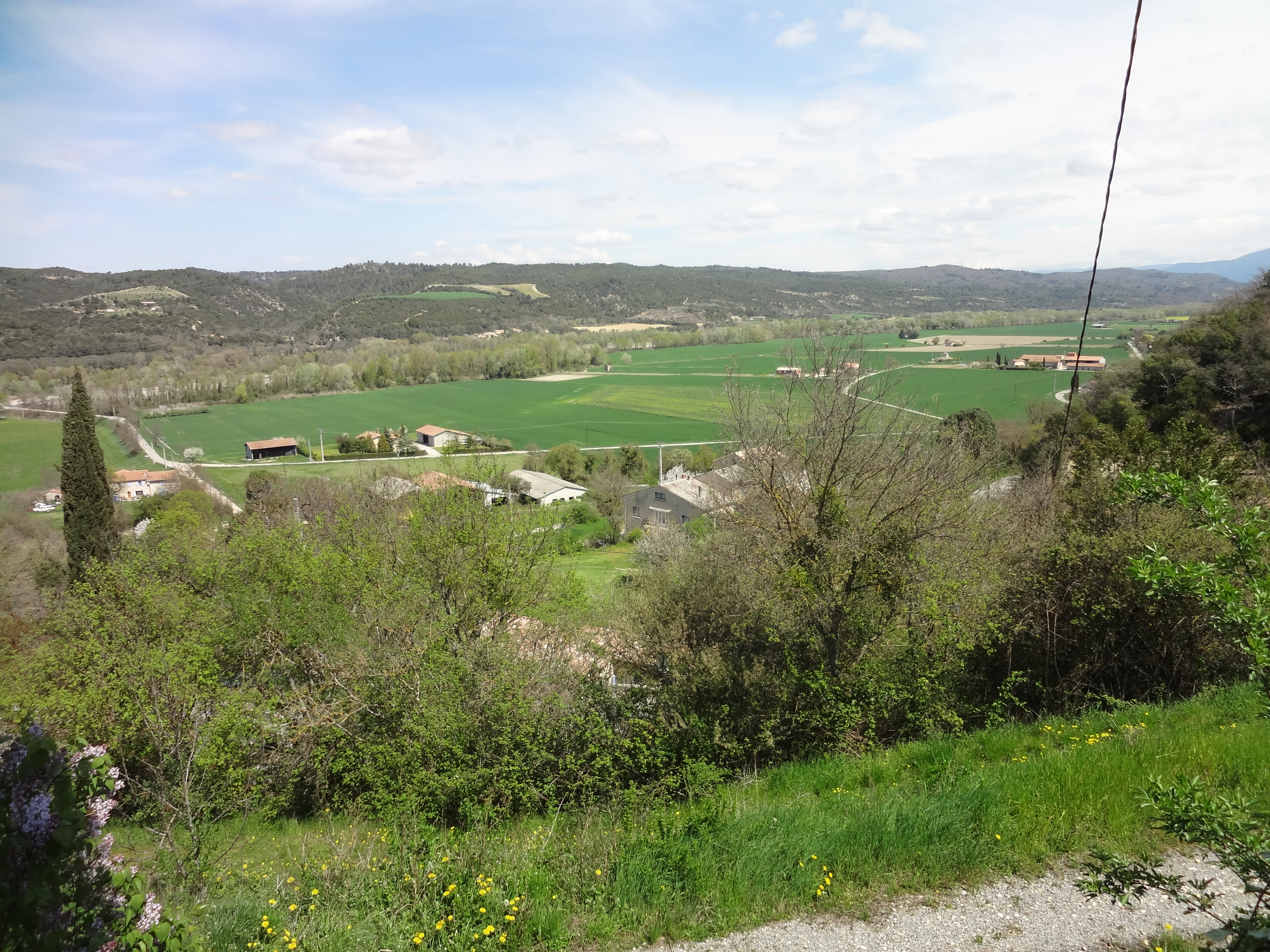 Vue de Brunet (Alpes-de-Haute-Provence) vers l'est